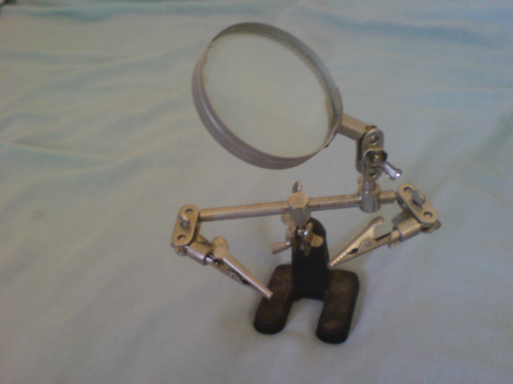 "третья рука" приспособление для фиксации при пайки